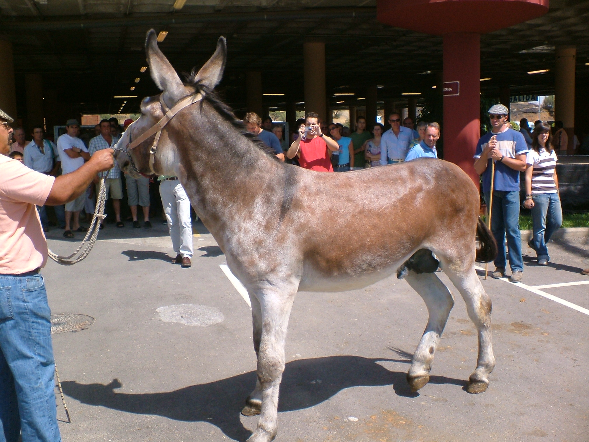 Semental de raza asnal andaluza Burro Garañón Andaluz Cordobés